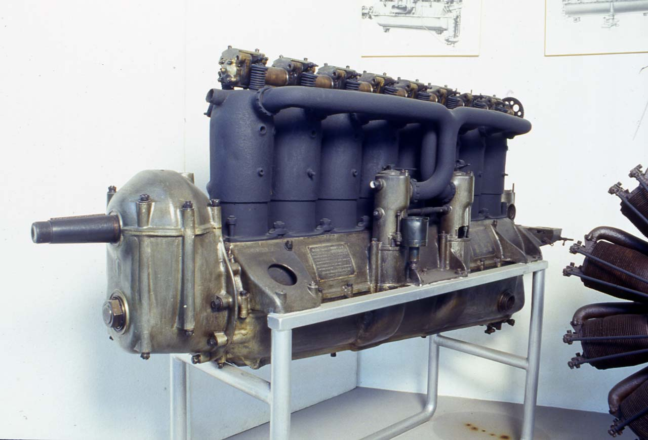 Motore a 8 cilindri in linea, raffreddato ad acqua. I cilindri sono in acciaio fuso con rivestimento in lamierino per la circolazione dell'acqua. La distribuzione avviene mediante valvole, azionate da un albero a camme in testa. Ogni cilindro, inoltre, dispone di due spazi per la sistemazione delle candele di accensione; sul fianco sinistro del motore è applicata una placca metallica che riporta lo schema elettrico di accensione delle candele. L'impianto di alimentazione consta di due carburatori situati sul fianco sinistro del motore, mentre sul fianco destro è sistemato lo scarico dei gas. Il fondo del carter costitusce la coppa dell'olio con tappo sul fianco sinistro. Notizie storico-critiche Nonostante gli ottimi risultati ottenuti dai motori a 6 cilindri durante la Prima Guerra mondiale, le esigenze belliche esigevano motori che sviluppassero sempre maggiori potenze. Visto che le conoscenze tecniche dell'epoca impedivano l'adozione di cilindri con diametro superiore ai 150 millimetri per la difficoltà di consentire il raffreddamento dello stantuffo, si cercò una soluzione nella realizzazione di motori ad 8 cilindri da parte di diverse case costruttrici. Per la maggior parte questi tentativi si tradussero in un fallimento per la scarsa affidabilità dei motori, dovuta all'insufficiente rigidezza del basamento e dell'albero a gomiti. Questo modello di motore decretò l'insuccesso dell'aereo sul quale venne montato, l'Albatros C.V.